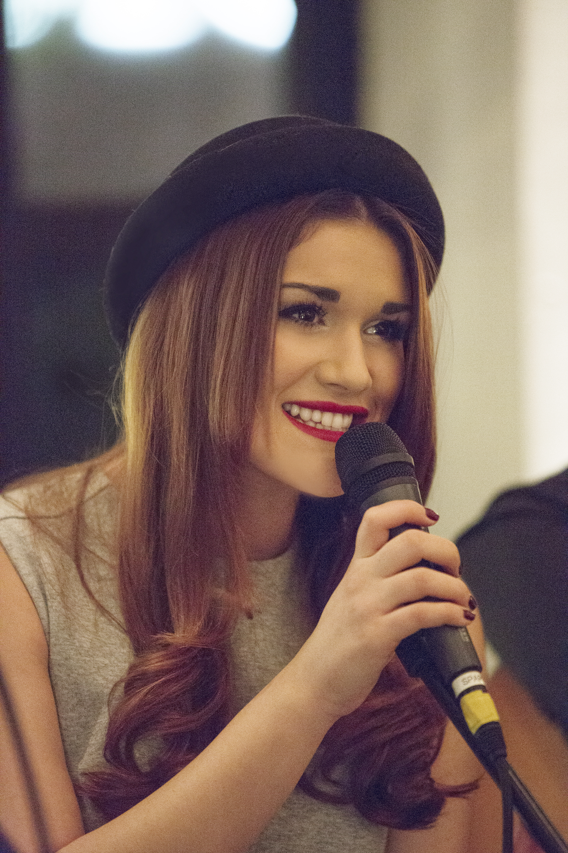 Selina Herrero Nunez bei einem Auftritt in Hamburg, Januar 2014 (©2014 Gruenderzeiten)